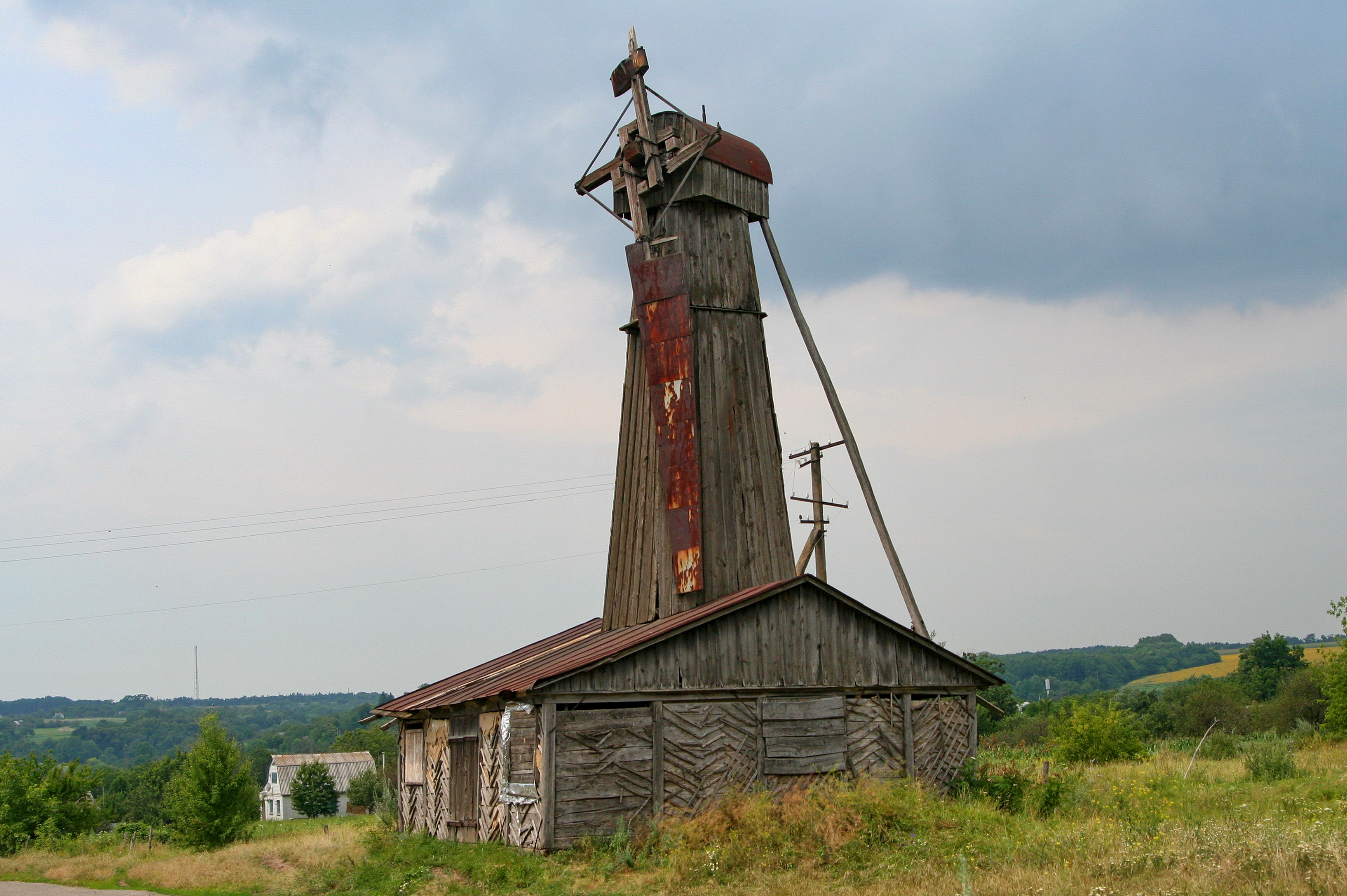 Вітряк (дер.), с. Грищенці